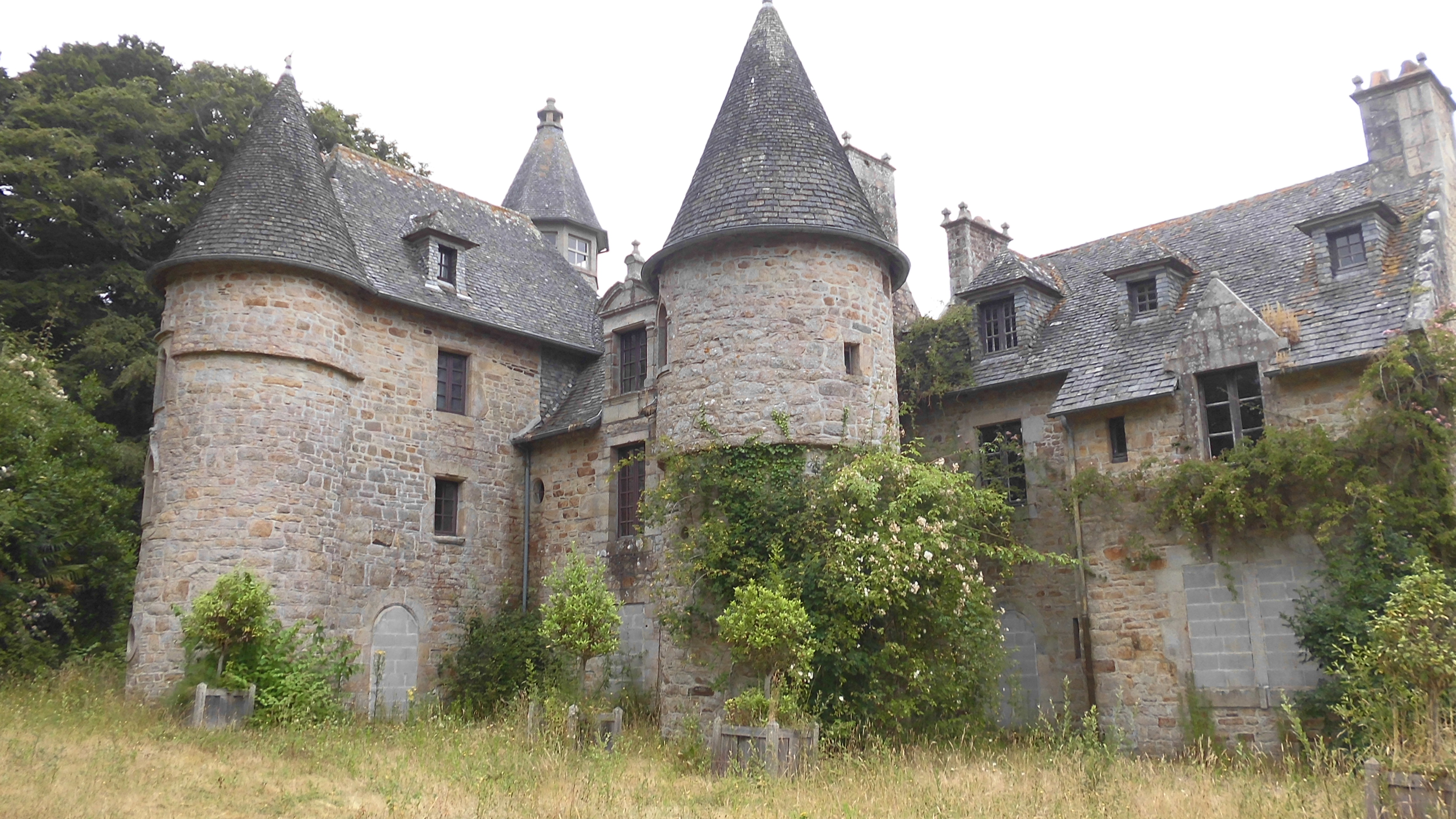 Charles Cornic a été un des premiers occupants du manoir de Suscinio.